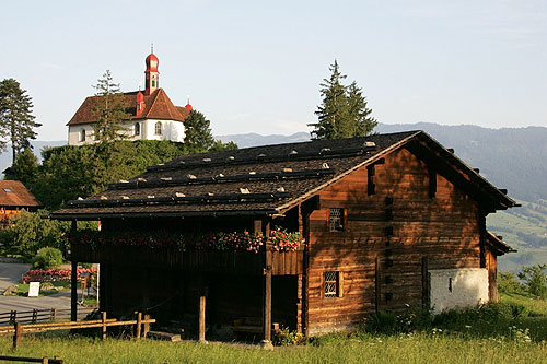 Flüeli-Kapelle und Wohnhaus von Niklaus v. Flüe (Bruder Klaus)